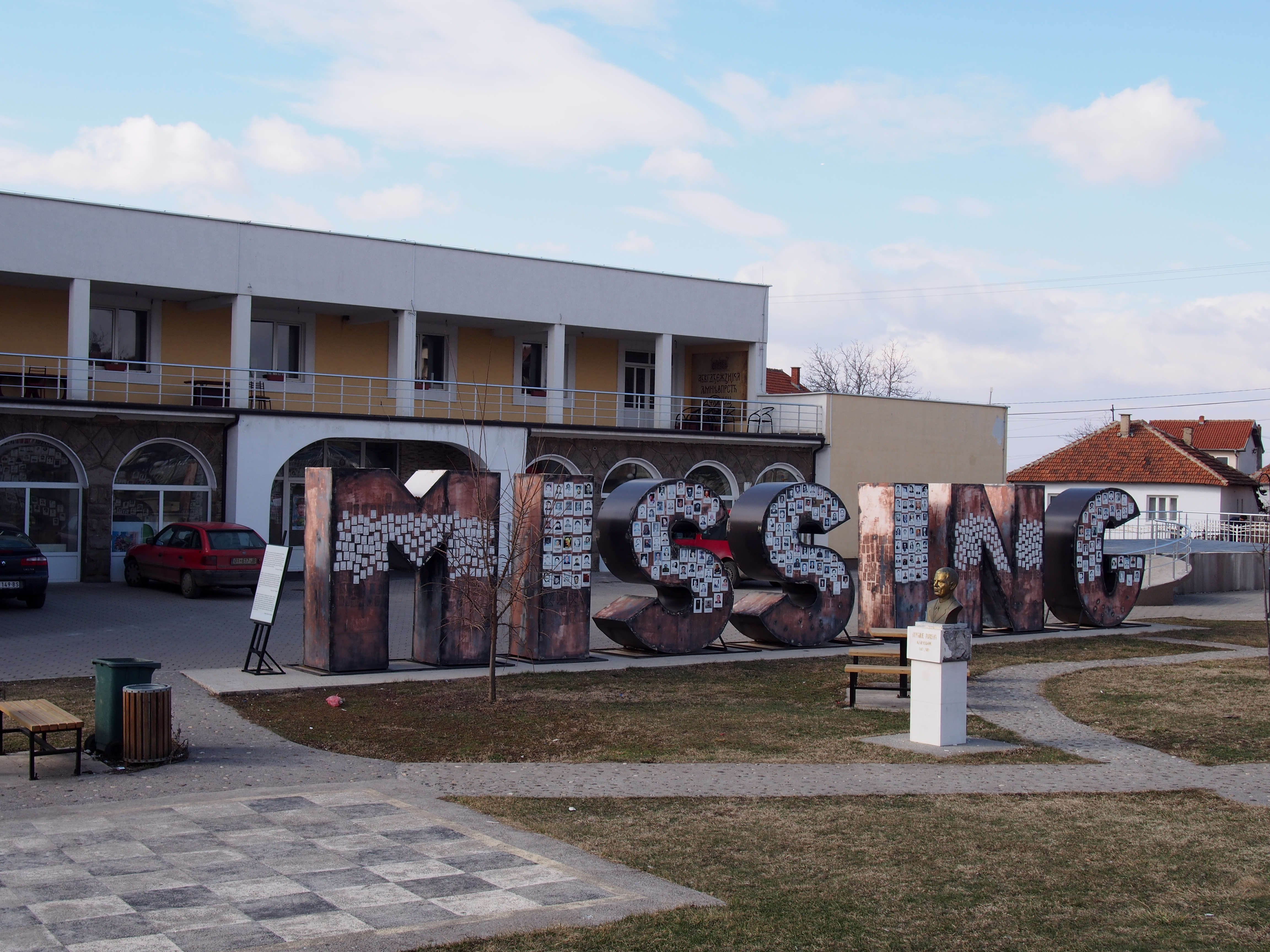 "Missing"-Monument in Gračanica/Graçanica (Kosovo)